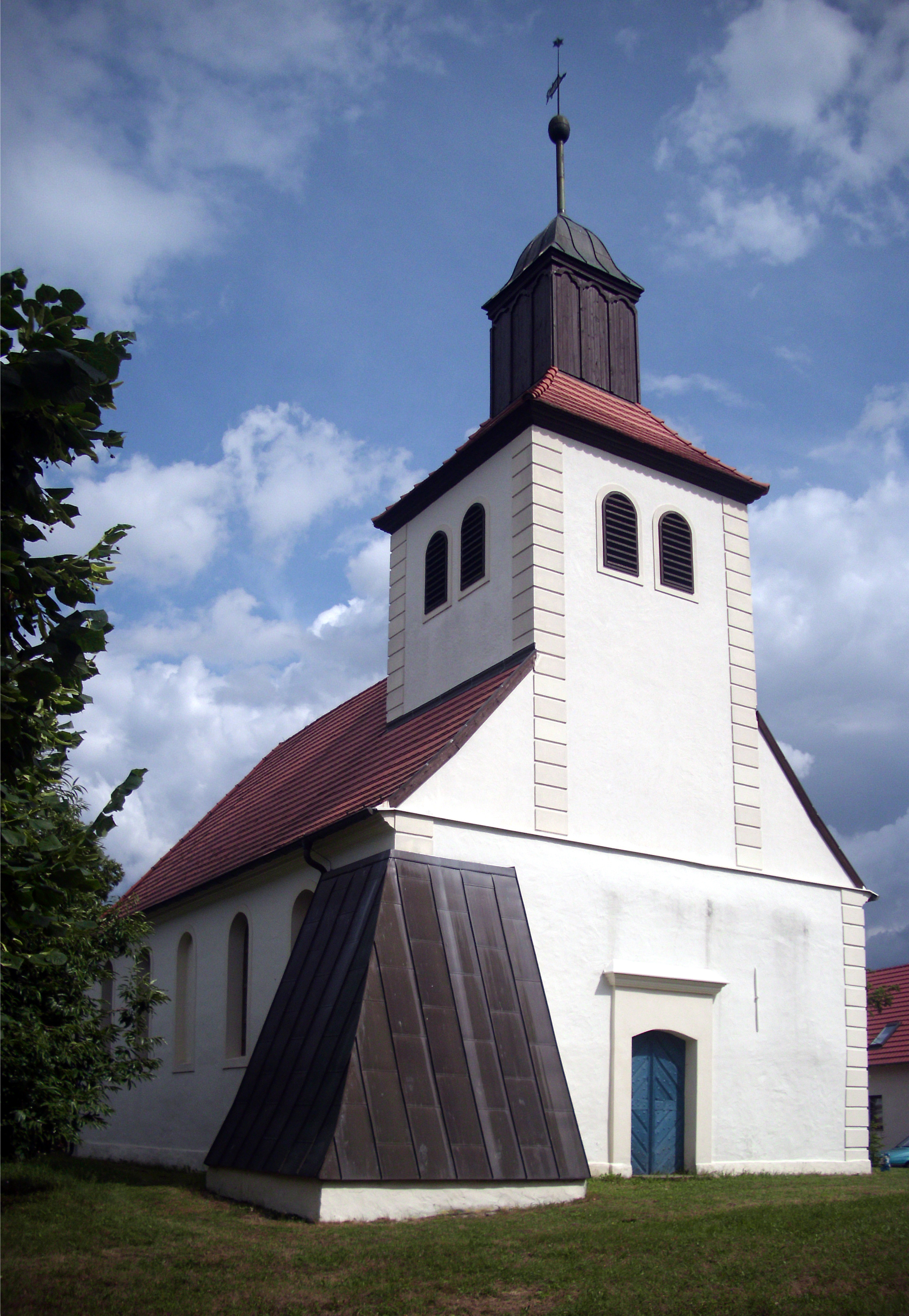 Dorfkirche Mixdorf, Amt Schlaubetal